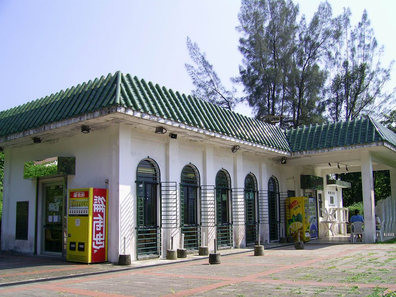 中文（香港）: 獅子會自然教育中心聰鳴茶座